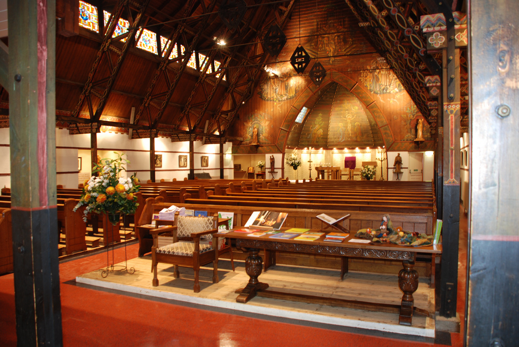 Interieur van de Aerdenhoutse Antonius van Paduakerk, gebouwd als noodkerk door Jos Cuypers enn Pierre Cuypers j.